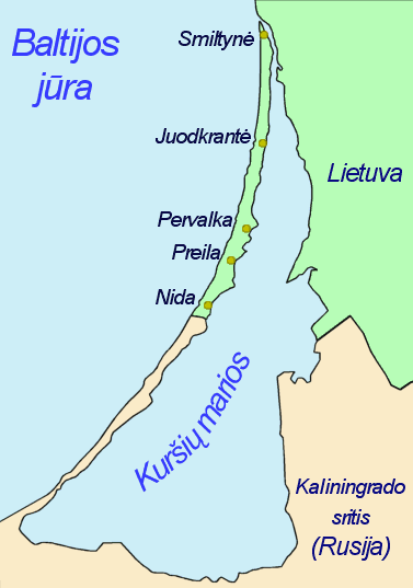 Kuršių nerija ir Kuršių marios